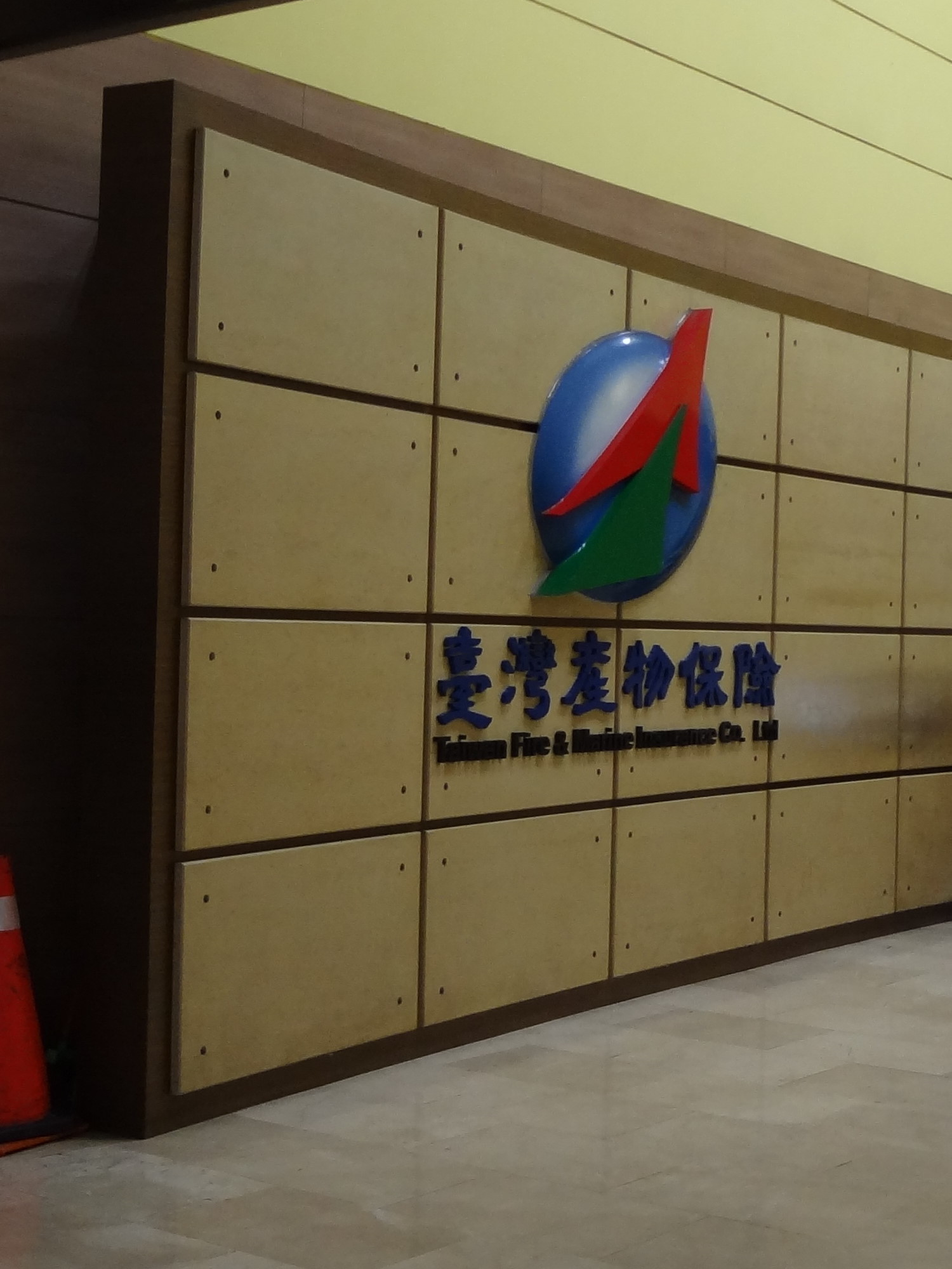 臺灣產物保險懷德大樓1樓大廳牆面釘掛的臺灣產物保險商標。